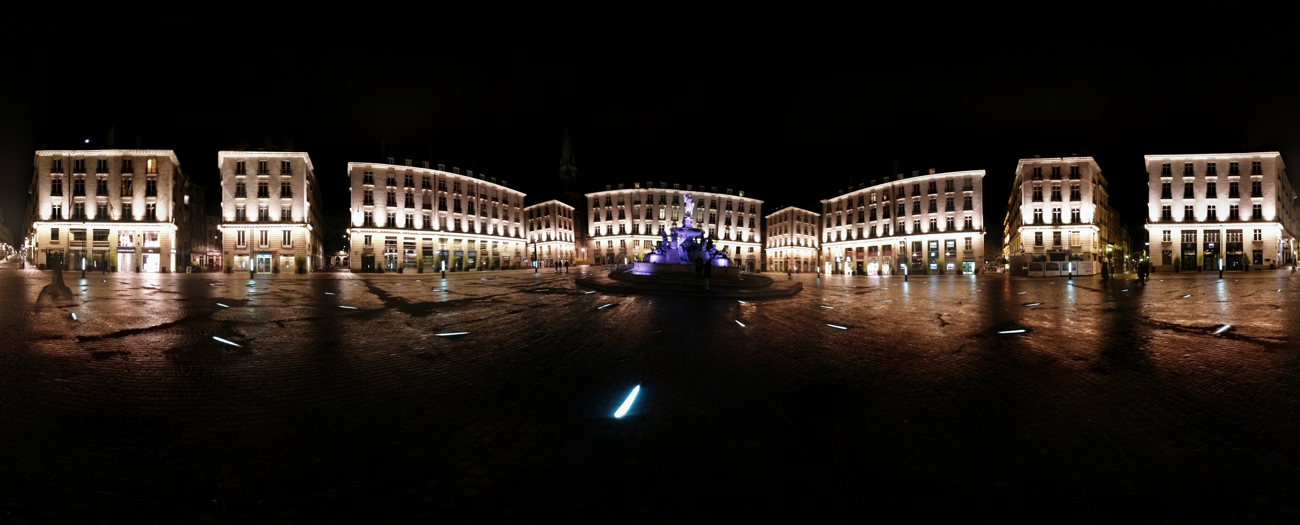 La place Royale, située au cœur de Nantes en France, est conçue en 1788 par l’architecte nantais Mathurin Crucy. Aménagée en 1790 après la destruction des remparts médiévaux, elle constitue l'élément central d'un ensemble homogène de bâtiments répondant à l'architecture classique construits à cette occasion. Elle est dotée d'une fontaine en 1865. Le site, très endommagé lors de la Seconde Guerre mondiale, est restauré à l'identique entre 1945 et 1961, et bénéficie d'une rénovation en 2007 qui la rend semi-piétonne, puis intégralement piétonnisée en 2011